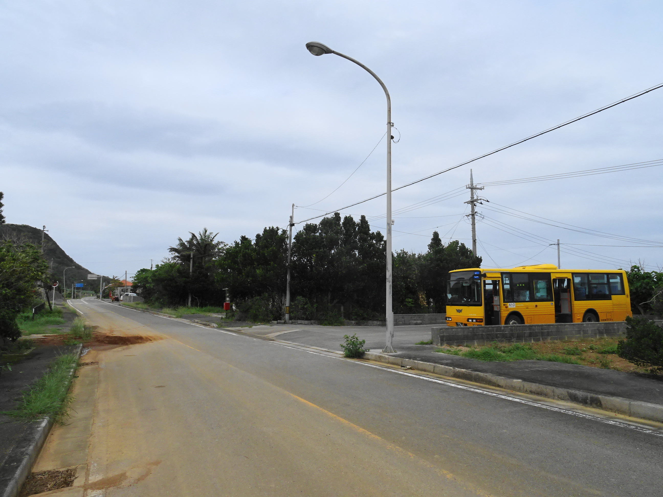 Hirano